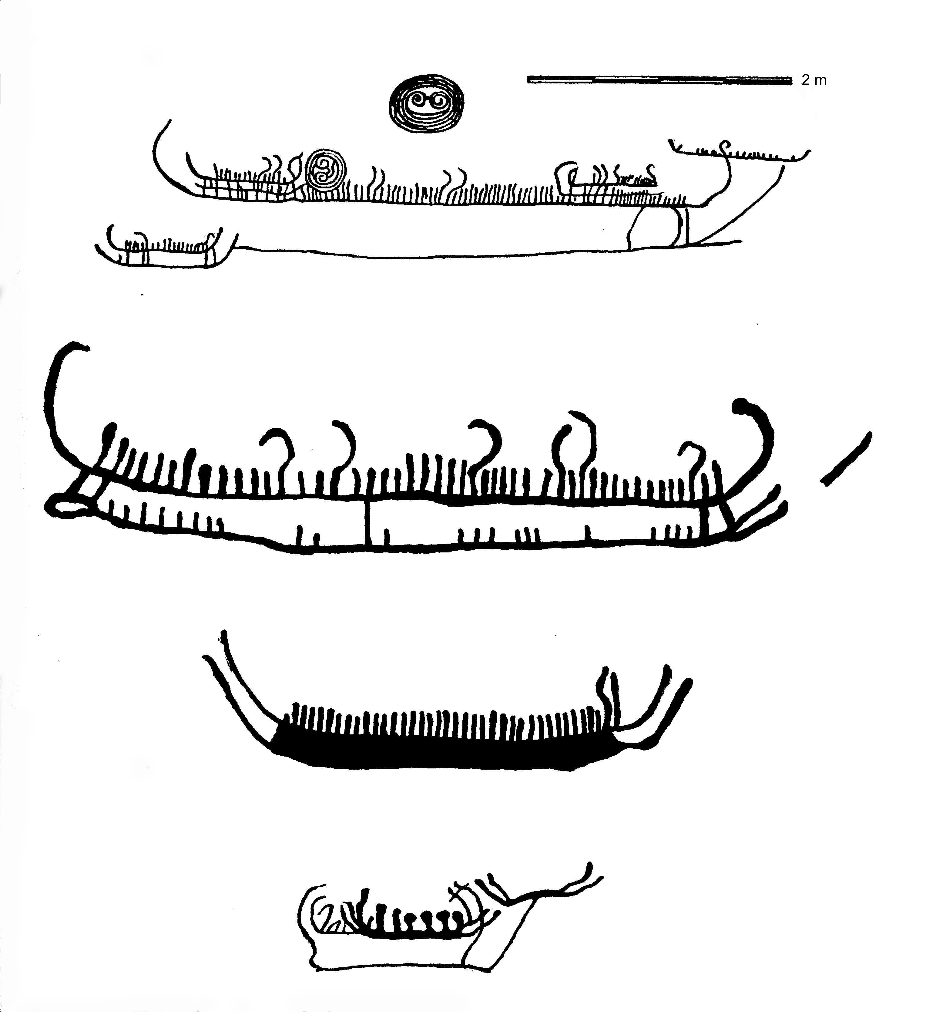 Skandinawische Felsritzungen von bronzezeitlichen Booten aus Bardal in Beitstad (Norwegen).